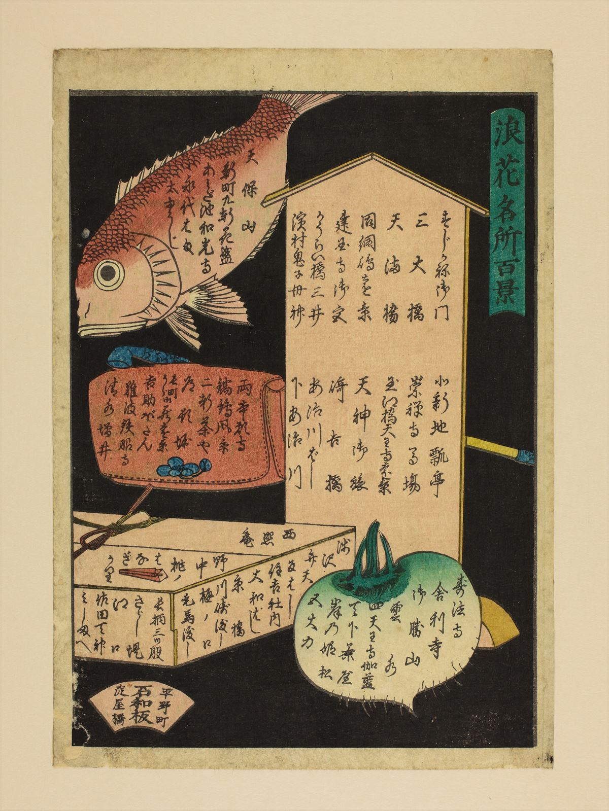 1800年代。歌川國員・里の家芳瀧・南粋亭芳雪/画 。浪花百景 102枚のうちの1枚、2枚の「もくじ」のうちの1枚。大阪市立中央図書館蔵。